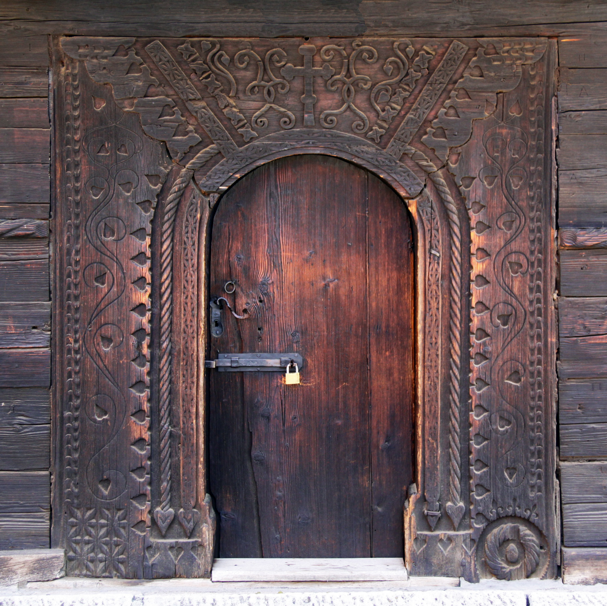 Portalul intrării Bisericii de lemn din Albac